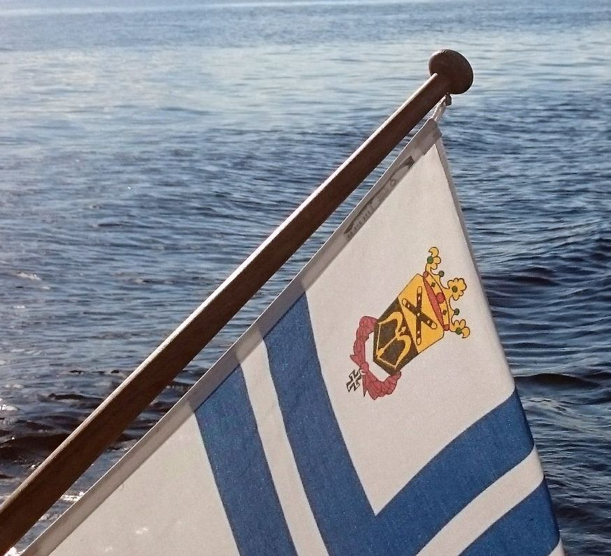 MPS:n pursilipun erikoismerkkinä on Mikkelin kaupungin vaakuna. Mikkelin kaupungin saatua 4. luokan vapaudenristin miekkoineen vuonna 1944, tuli Mikkelin pursiseurasta samalla ainoa suomalainen veneilyseura jonka lipussa on ritarikunnan kunniamerkki.